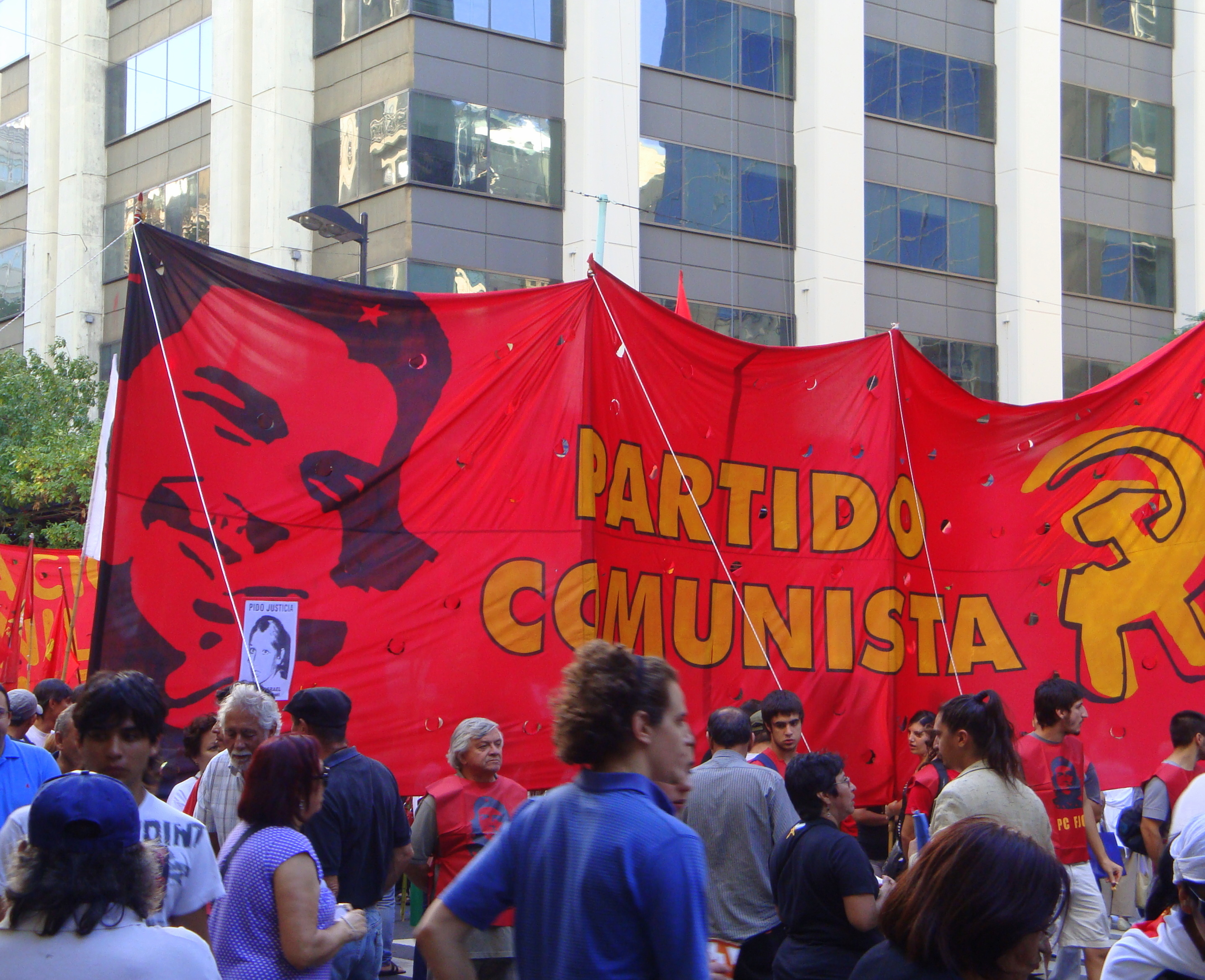 Militantes del PCA durante un acto por el Día Nacional de la Memoria por la Verdad y la Justicia